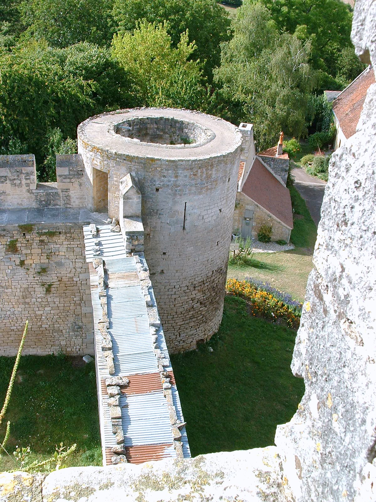 Château-fort de Druyes-les-belles-Fontaines, Yonne) - vue depuis la tour-porche